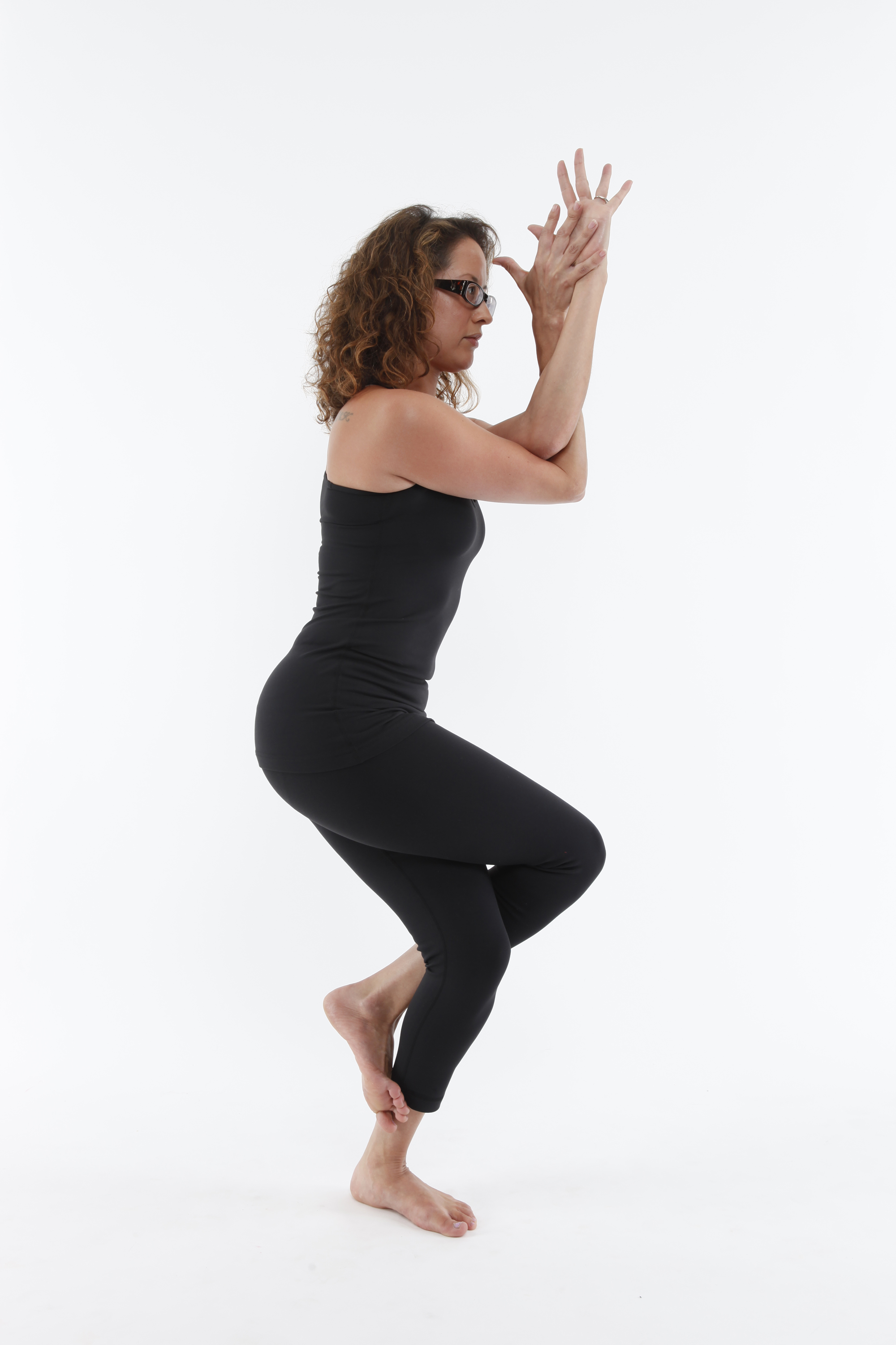 Garuḍāsana - Eagle Pose 2 Side view